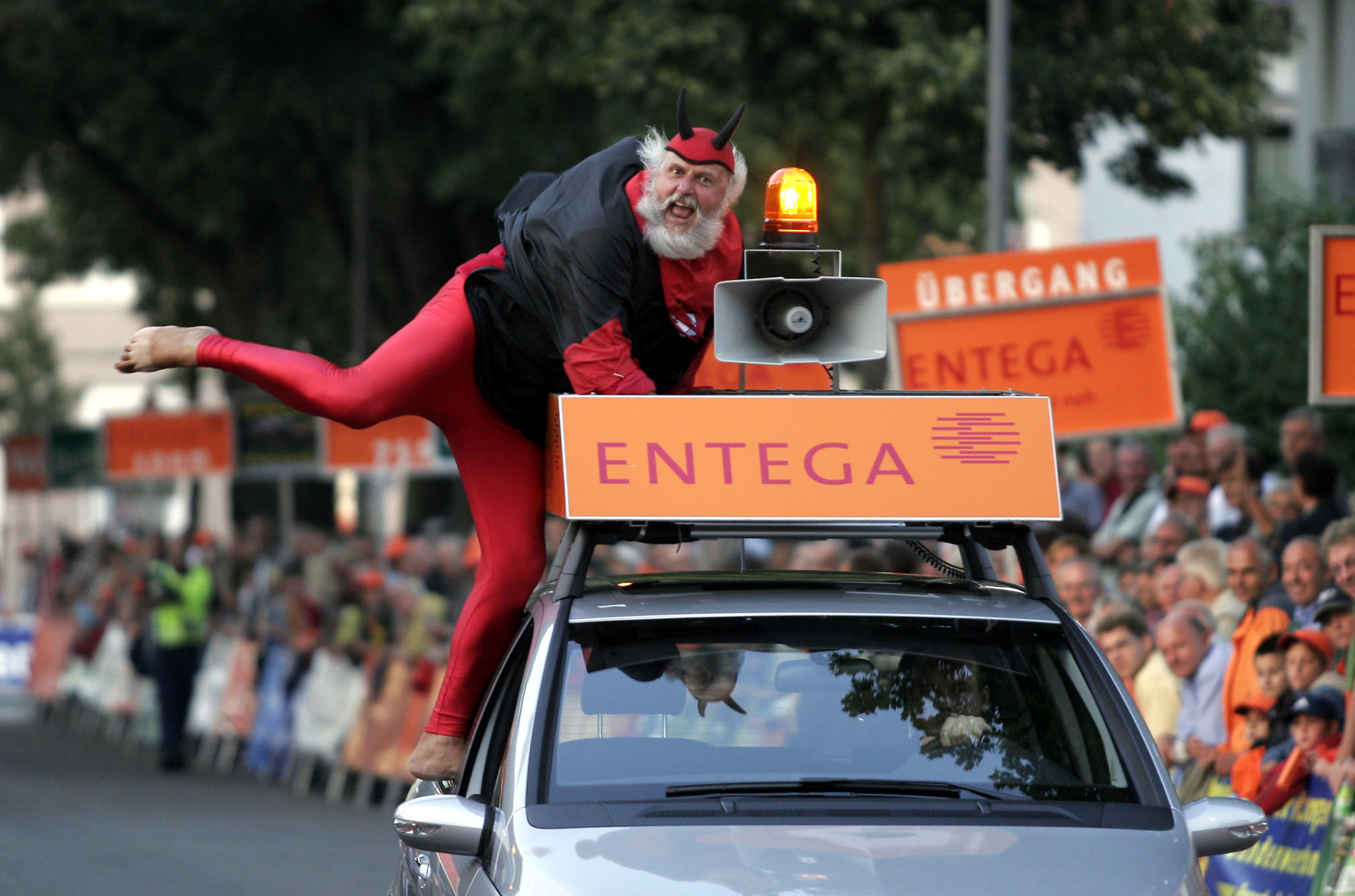 Didi Senft, legendärer Fan des Radsports, am 2. August 2007 in Lorsch beim Entega Grand Prix 2007